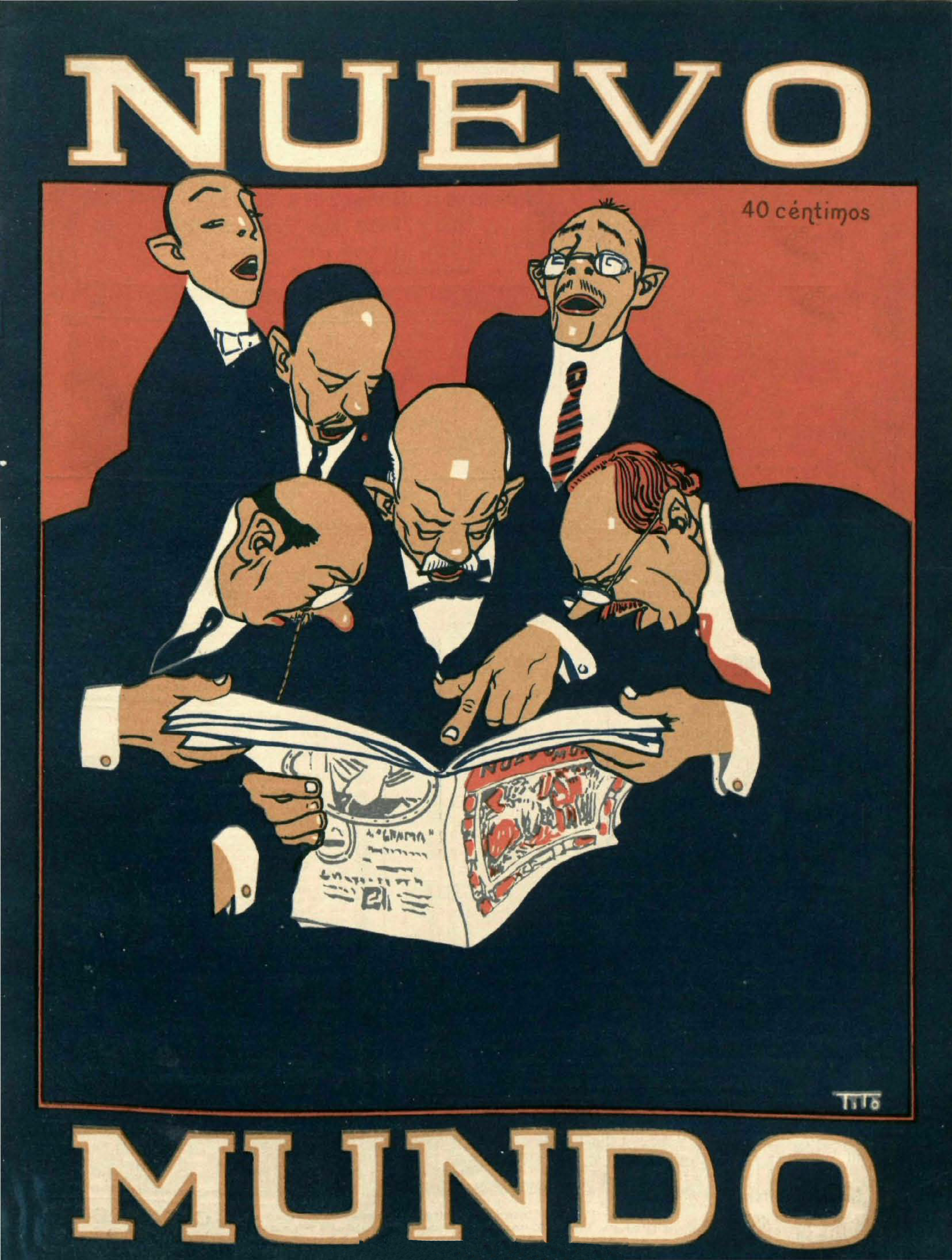 Nuevo Mundo, 10 de octubre de 1919.